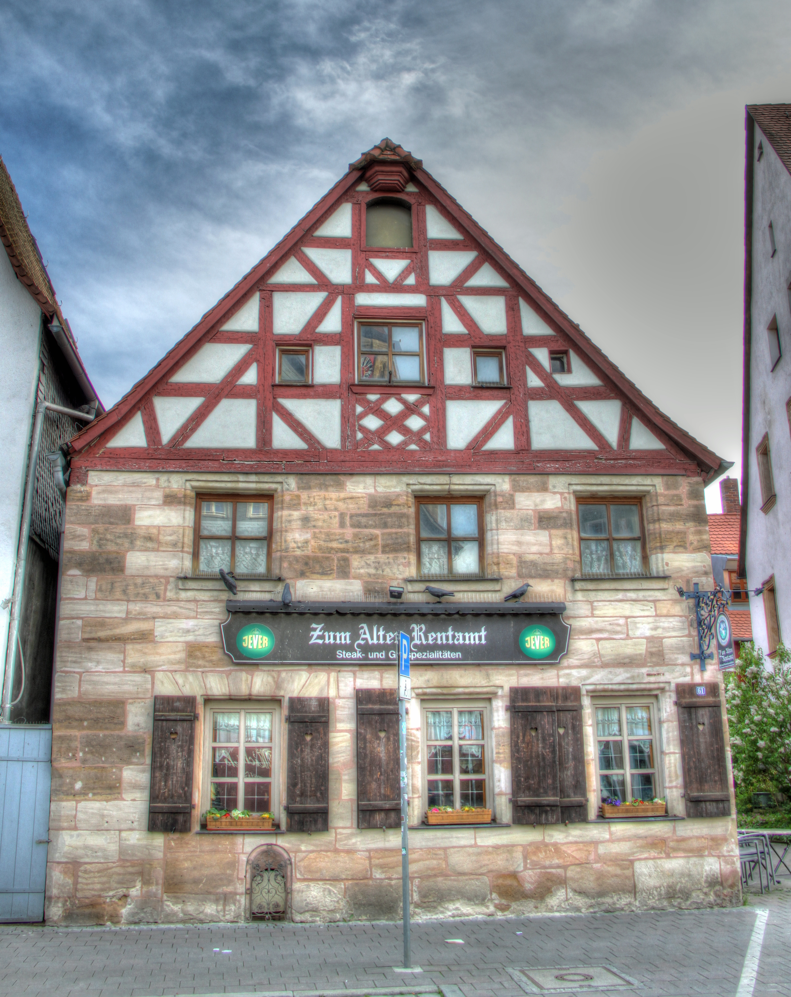 Gaststätte Altes Rentamt Gustavstraße 61 in Fürth, Gründungsort der SpVgg Fürth